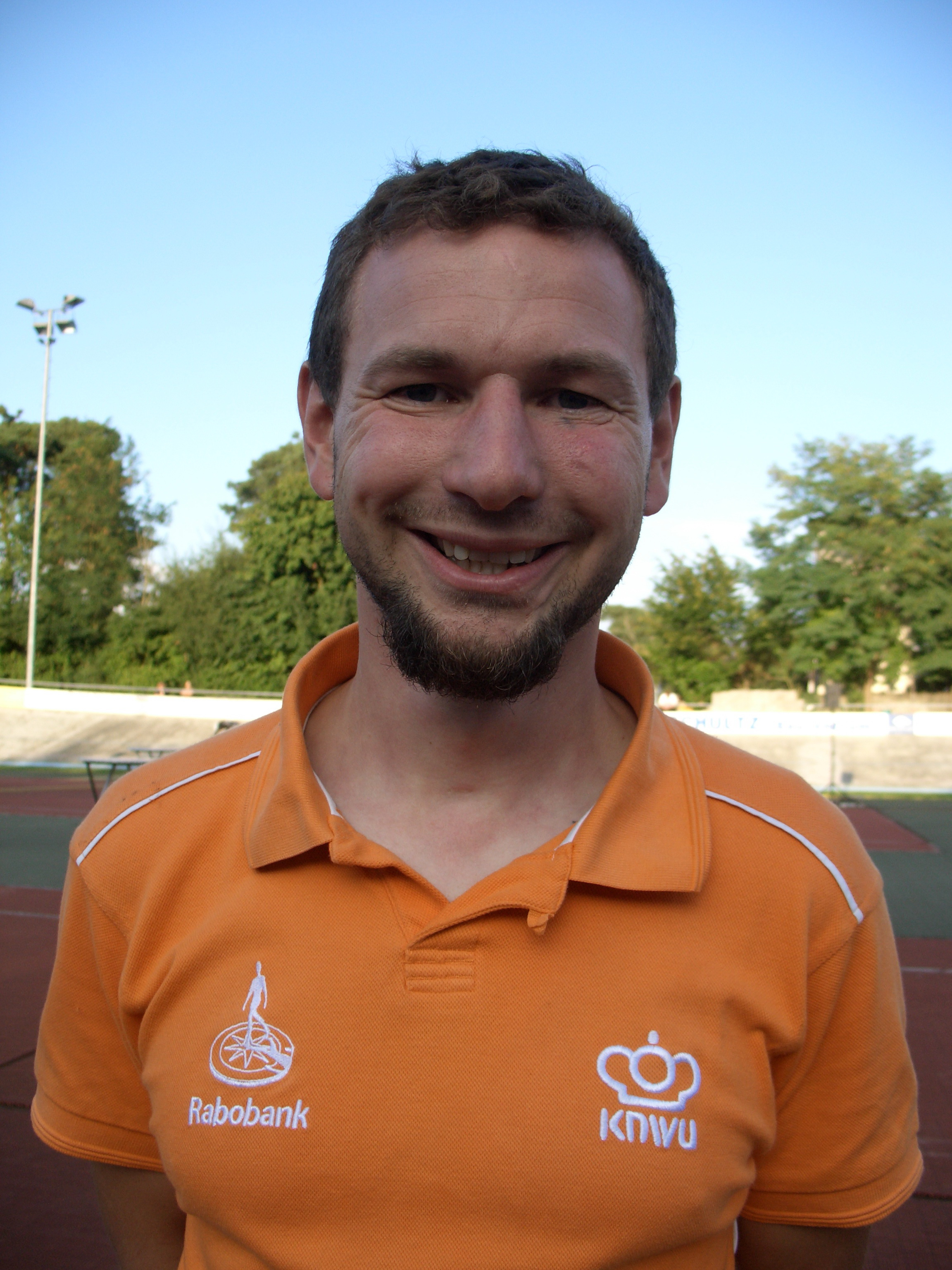 René Wolff, ehem. deutscher Radsportler und niederl. Verbandstrainer